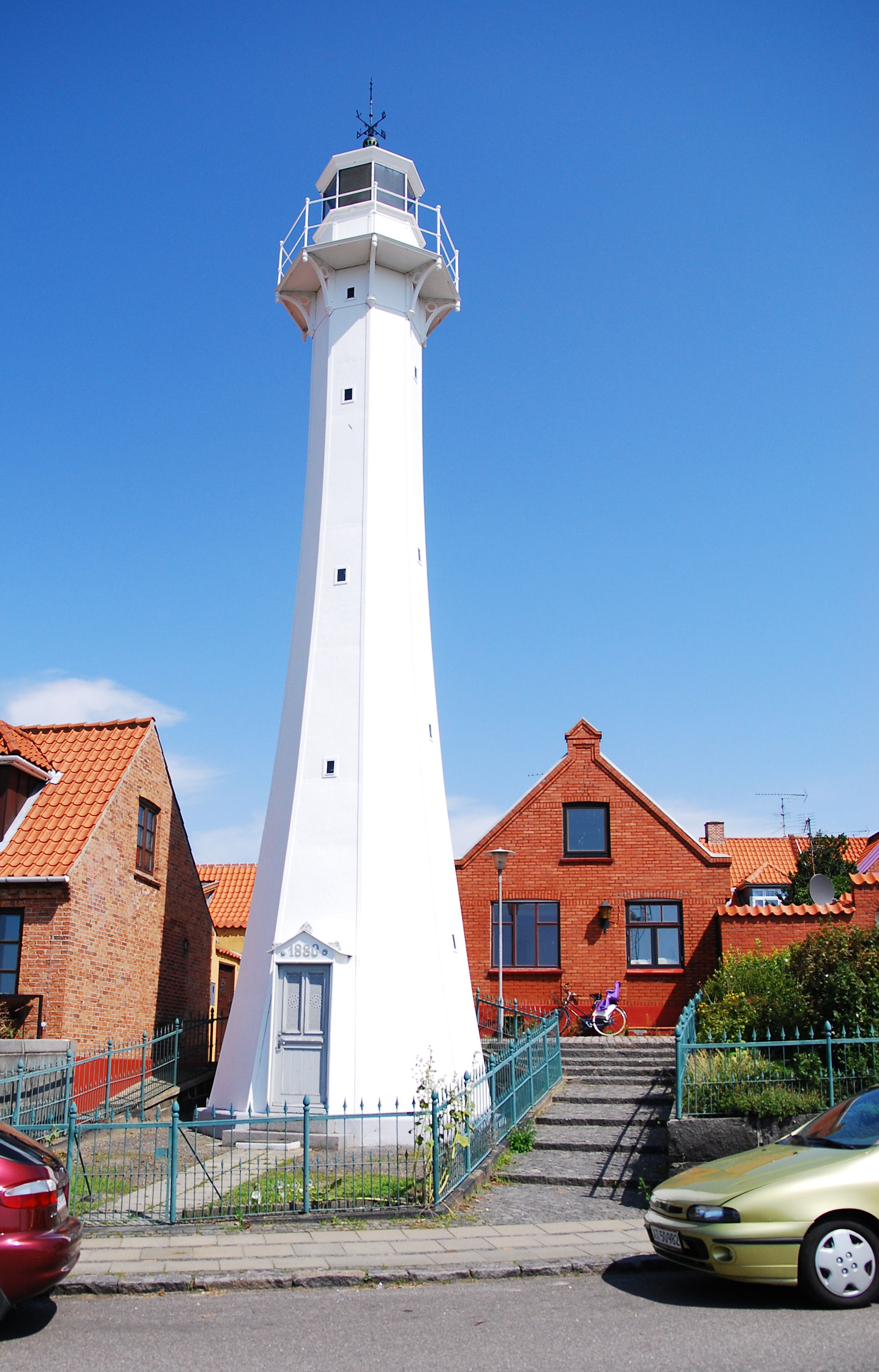 Latarnia morska w Rønne na Bornholmie